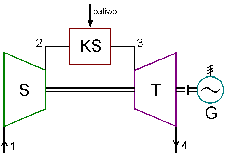 Schemat turbiny gazowej w układzie otwartym; S - sprężarka, KS - komora spalania, T - turbina, G - generator elektryczny